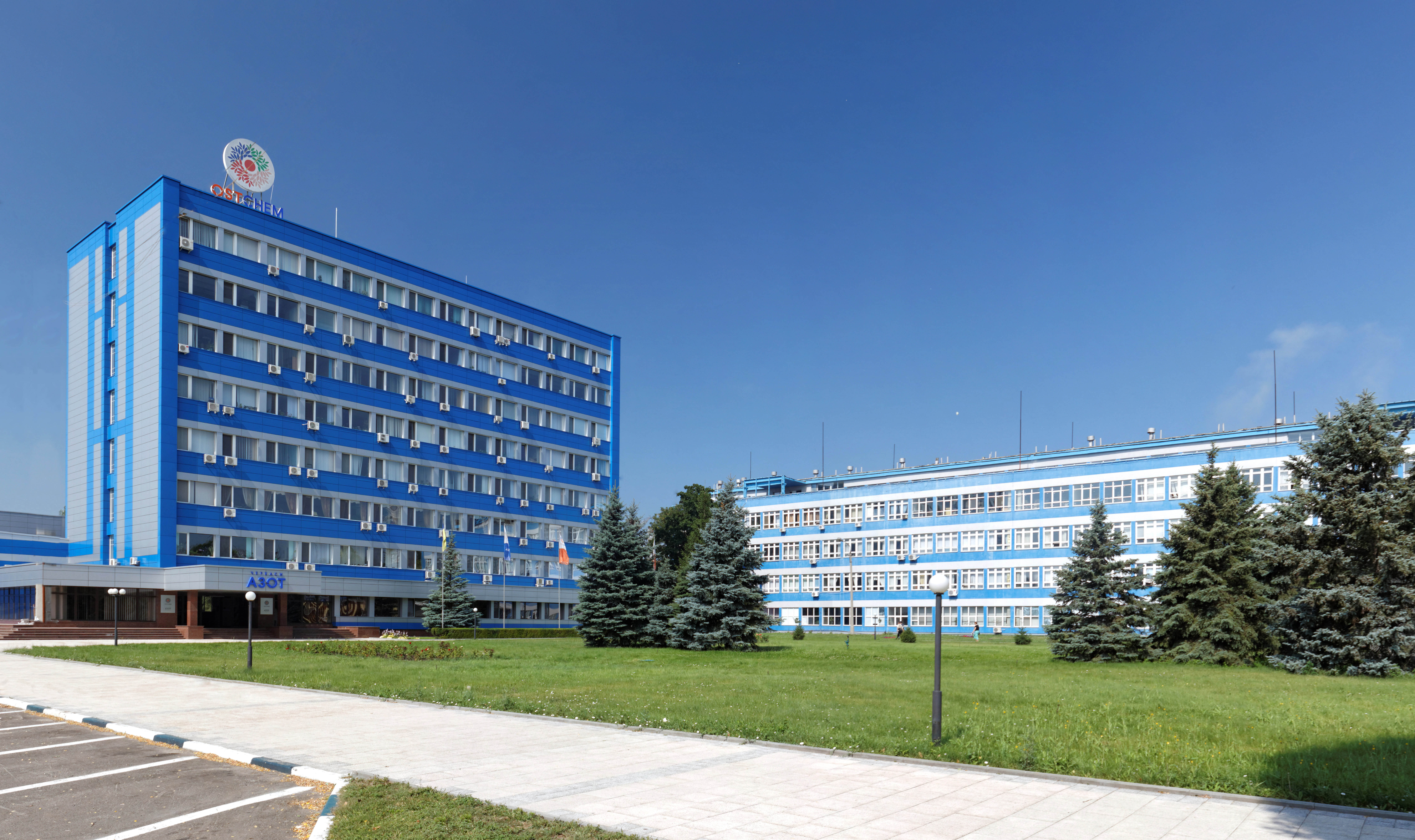 Адміністративний корпус ПАТ "Азот"